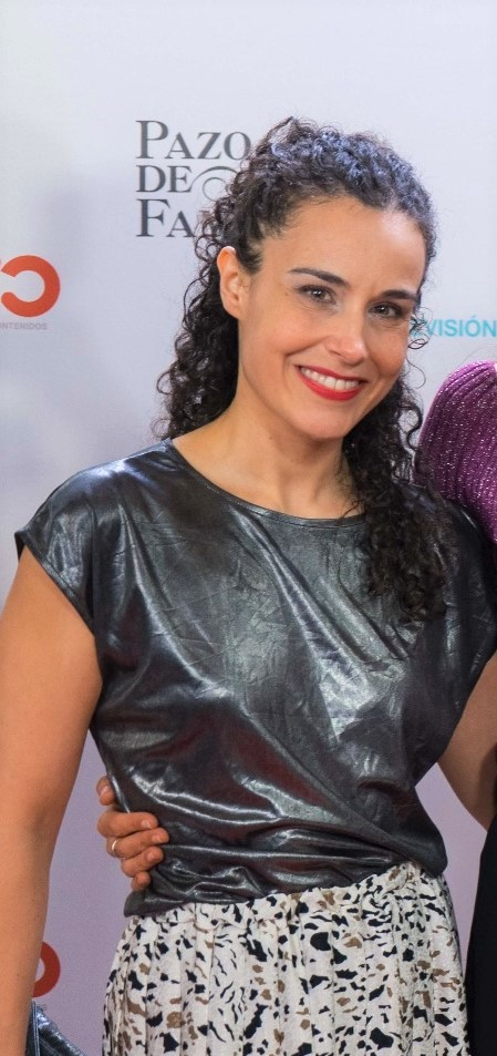 Fiesta de despedida de la serie de la TVG "Pazo de Familia" realizada en Santiago de Compostela.